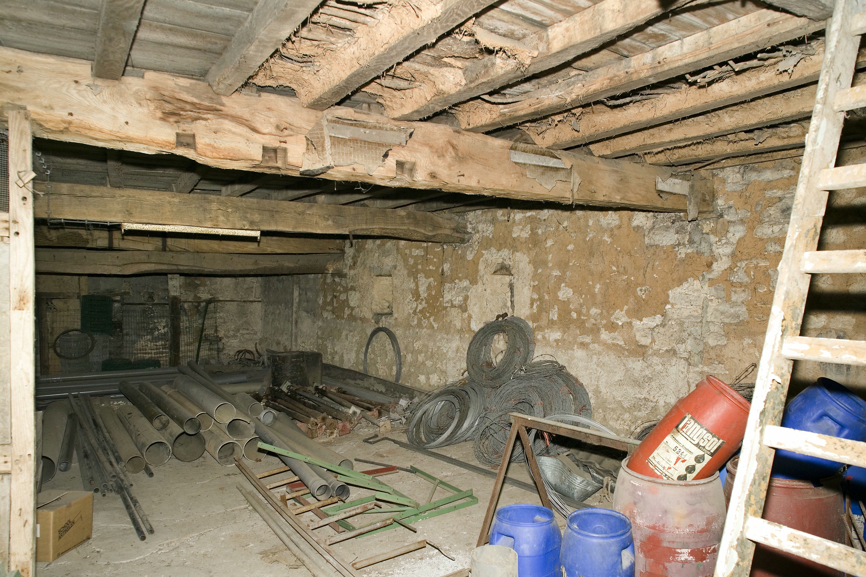 Hoeve Overhuizen: Interieur stal, overzicht balklaag